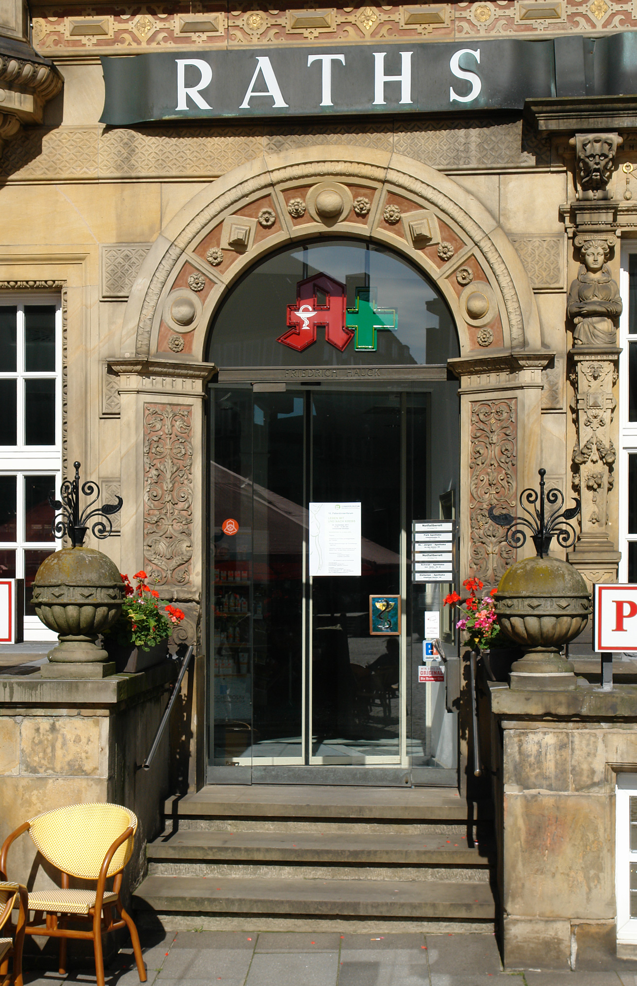 Raths-Apotheke in Bremen, Am Markt 11 - Eingang.Das abgebildete Objekt ist ein geschütztes Kulturdenkmal in der Freien Hansestadt Bremen, mit der Nr. 0070 beim Landesamt für Denkmalpflege registriert.